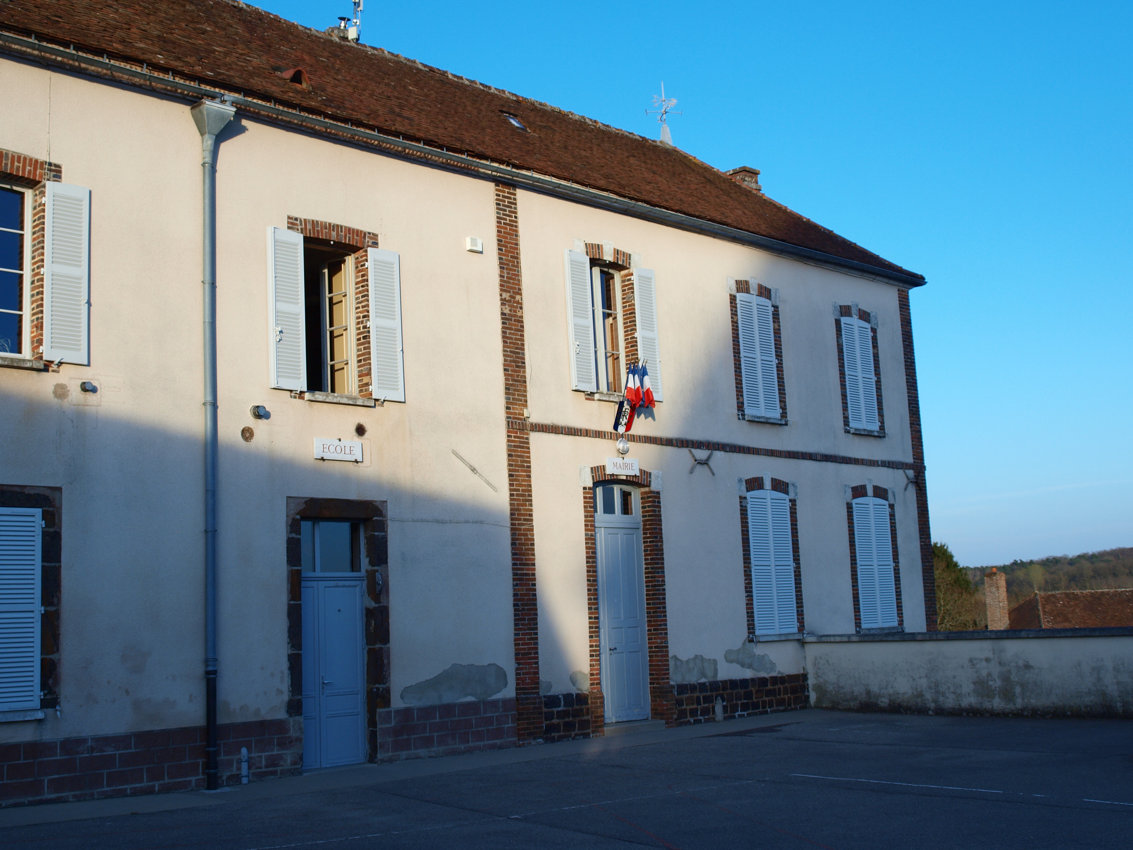 Parly (Yonne, France) , dans le village : mairie